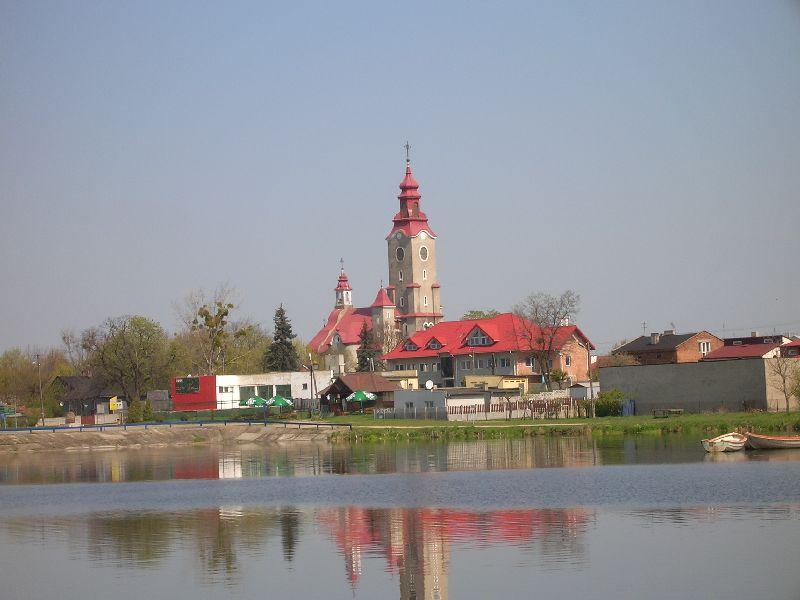 Stryków - zalew.